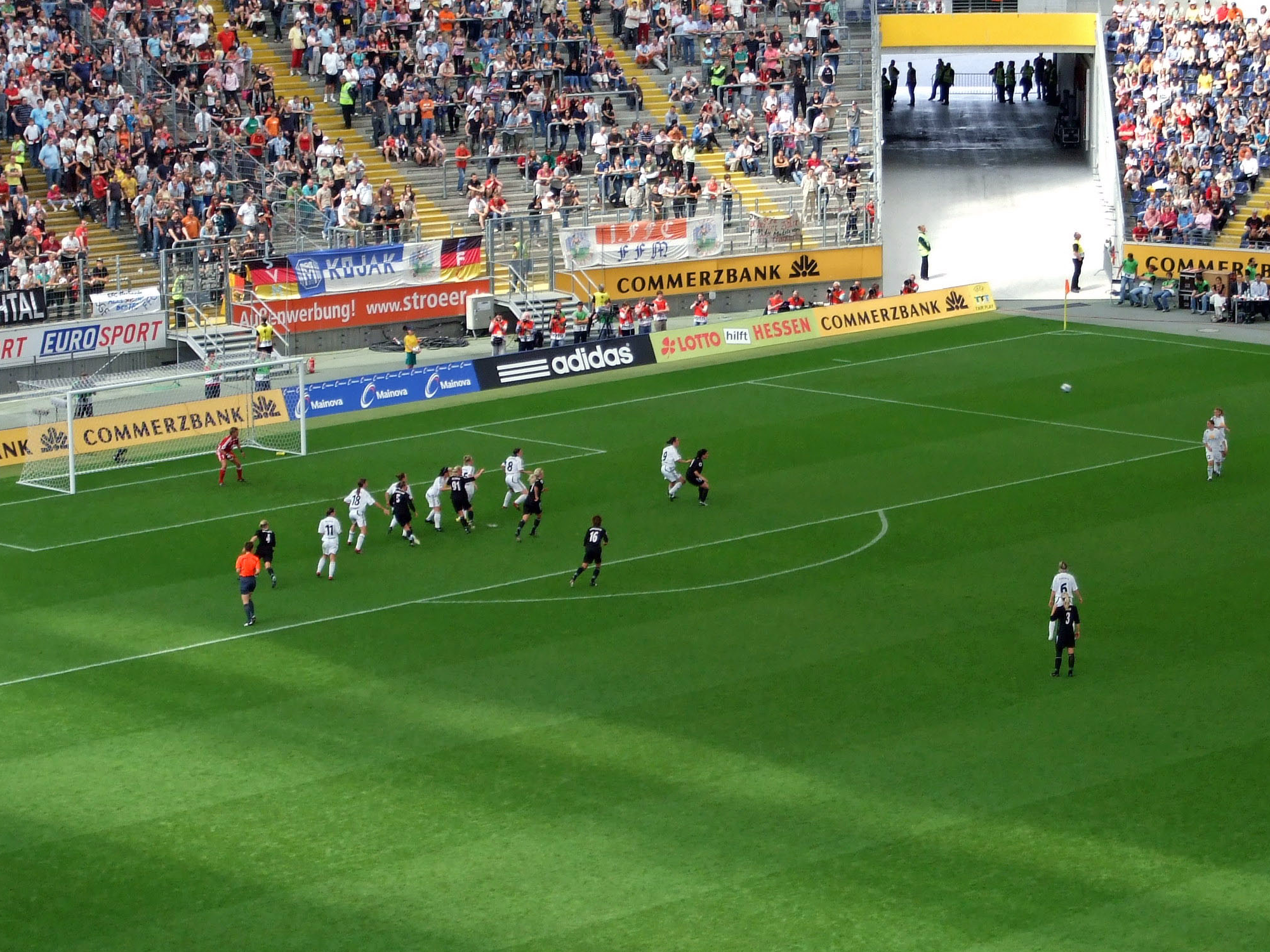 1. Halbzeit, Freistoss von Umeå gegen den 1. FFC, Commerzbank-Arena bei dem UEFA-Women's-Cup 2007/2008, Finalrückspiel zwischen 1. FFC Frankfurt und Umeå IK damfotboll